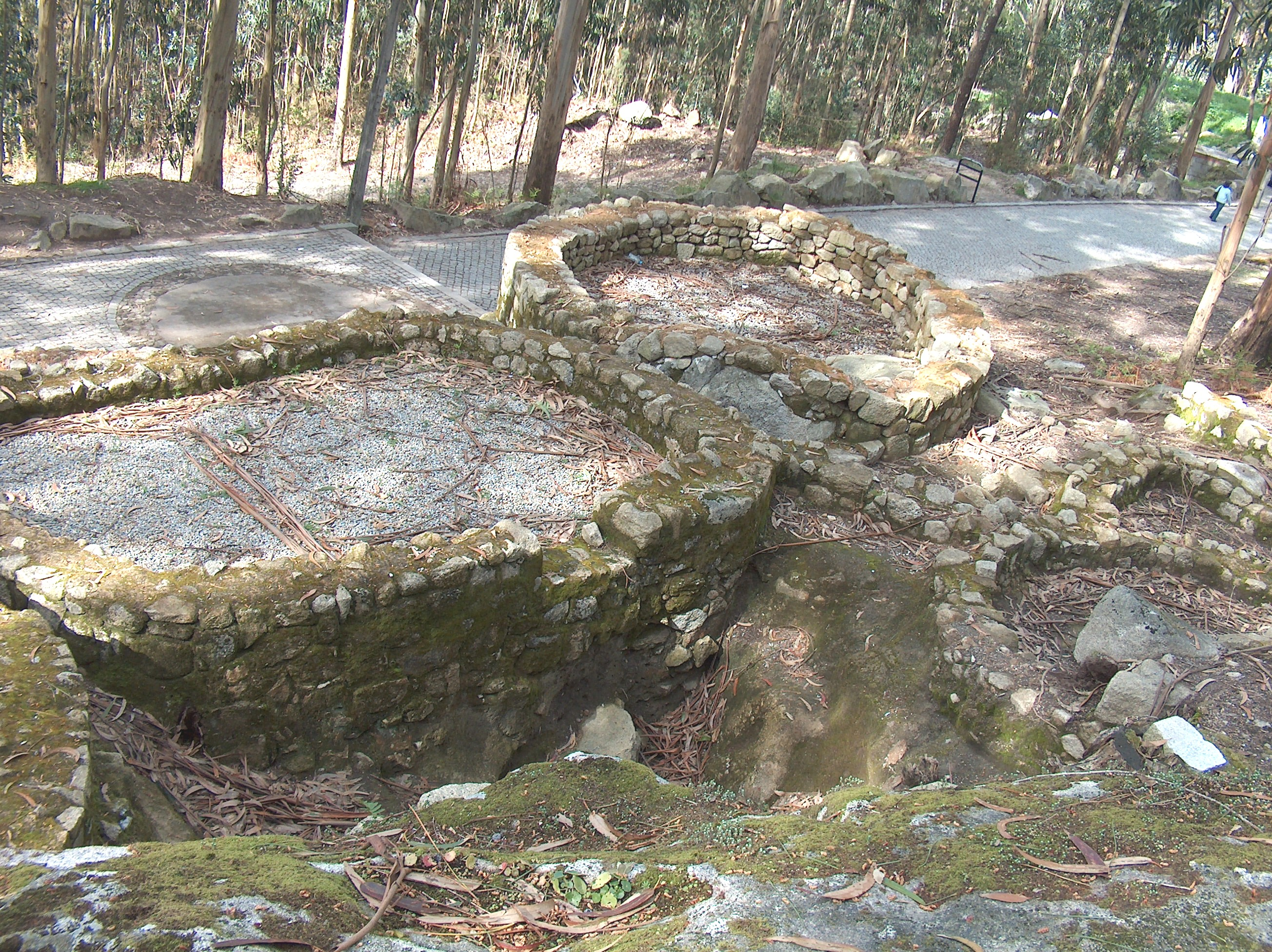 Castro de São Lourenço. Castro de São Lourenço, na freguesia de Vila Chã,concelho de Esposende, distrito de Braga, Portugal.